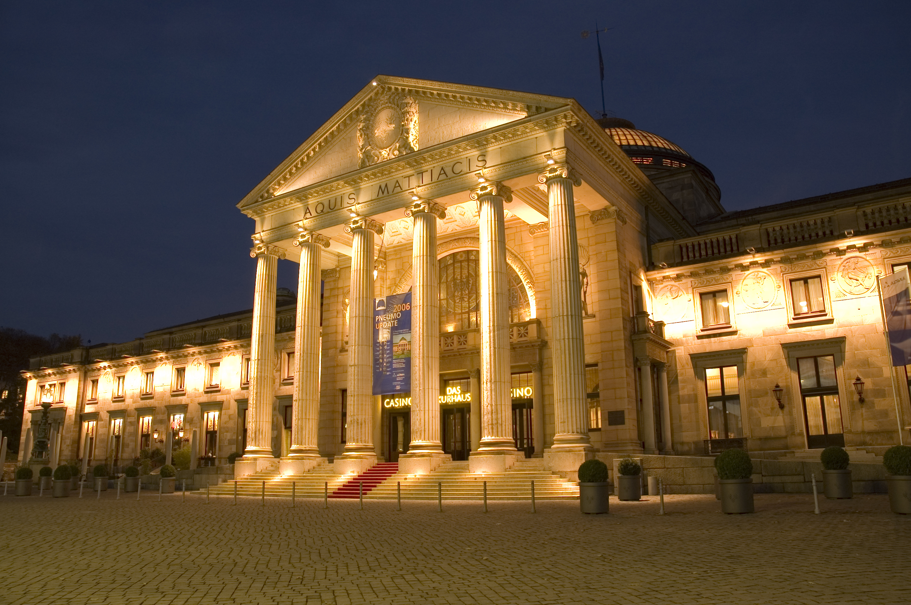 Wiesbadener Kurhaus bei Nacht